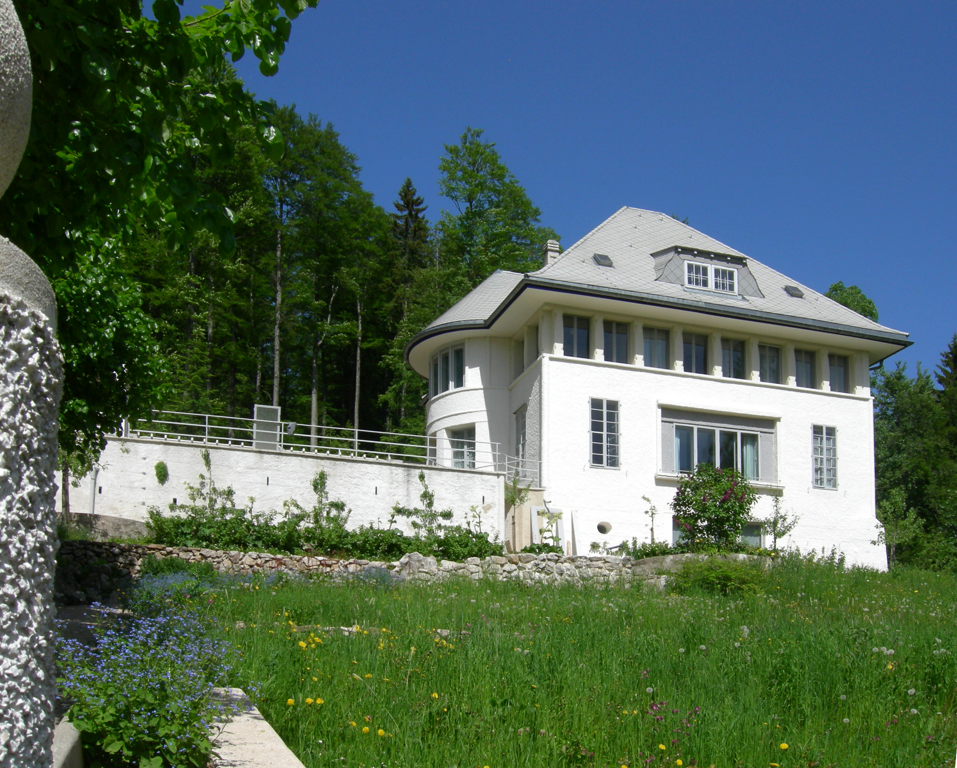 La Chaux-de-Fonds, "Maison blanche"